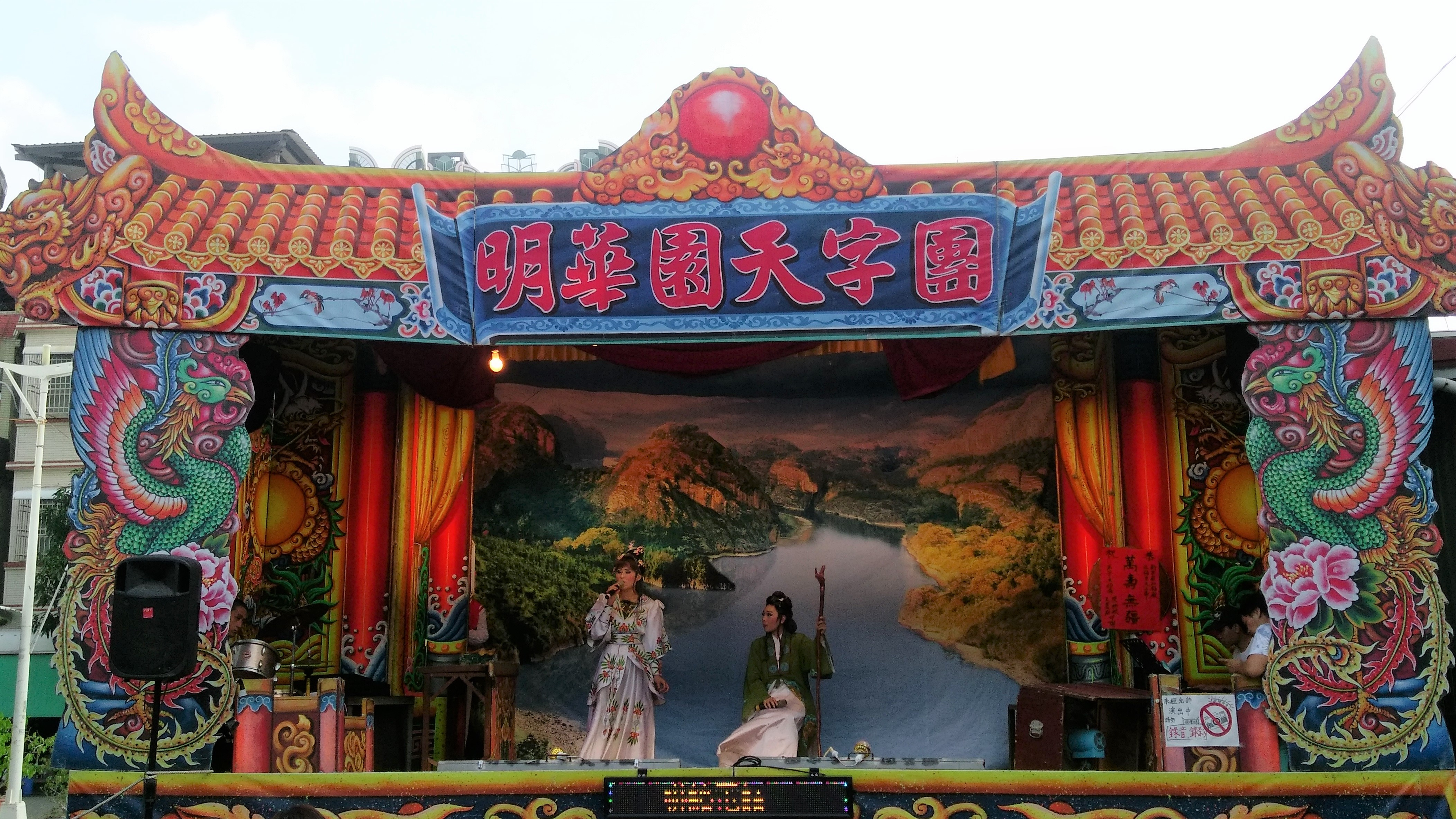 中文（台灣）: 明華園天字團演出